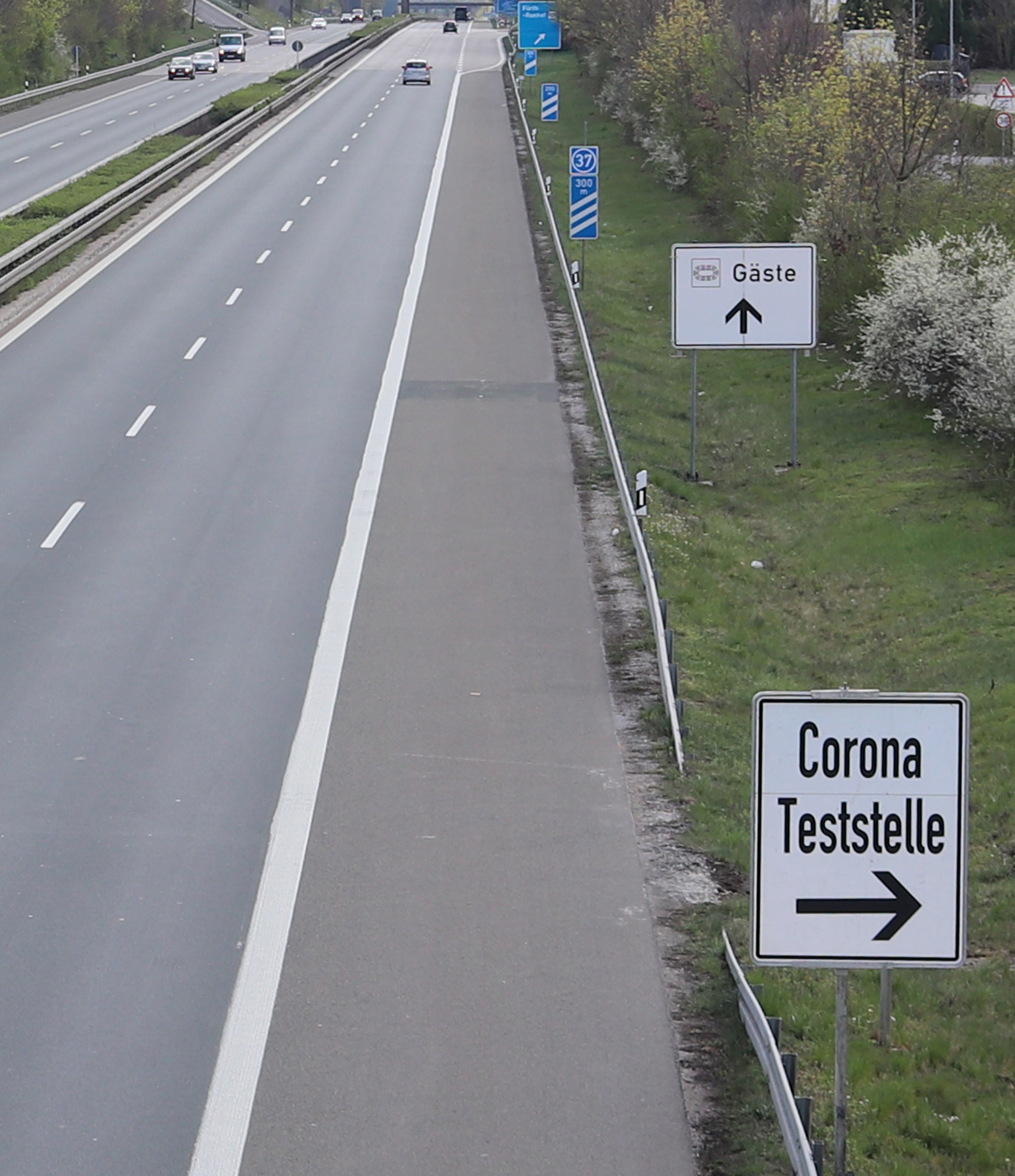 Hinweis auf die "Drive-in"-Covid-19-Teststelle ("Corona-Teststelle") in Fürth (für Stadt und Landkreis) an der der Bundesautobahn 73.